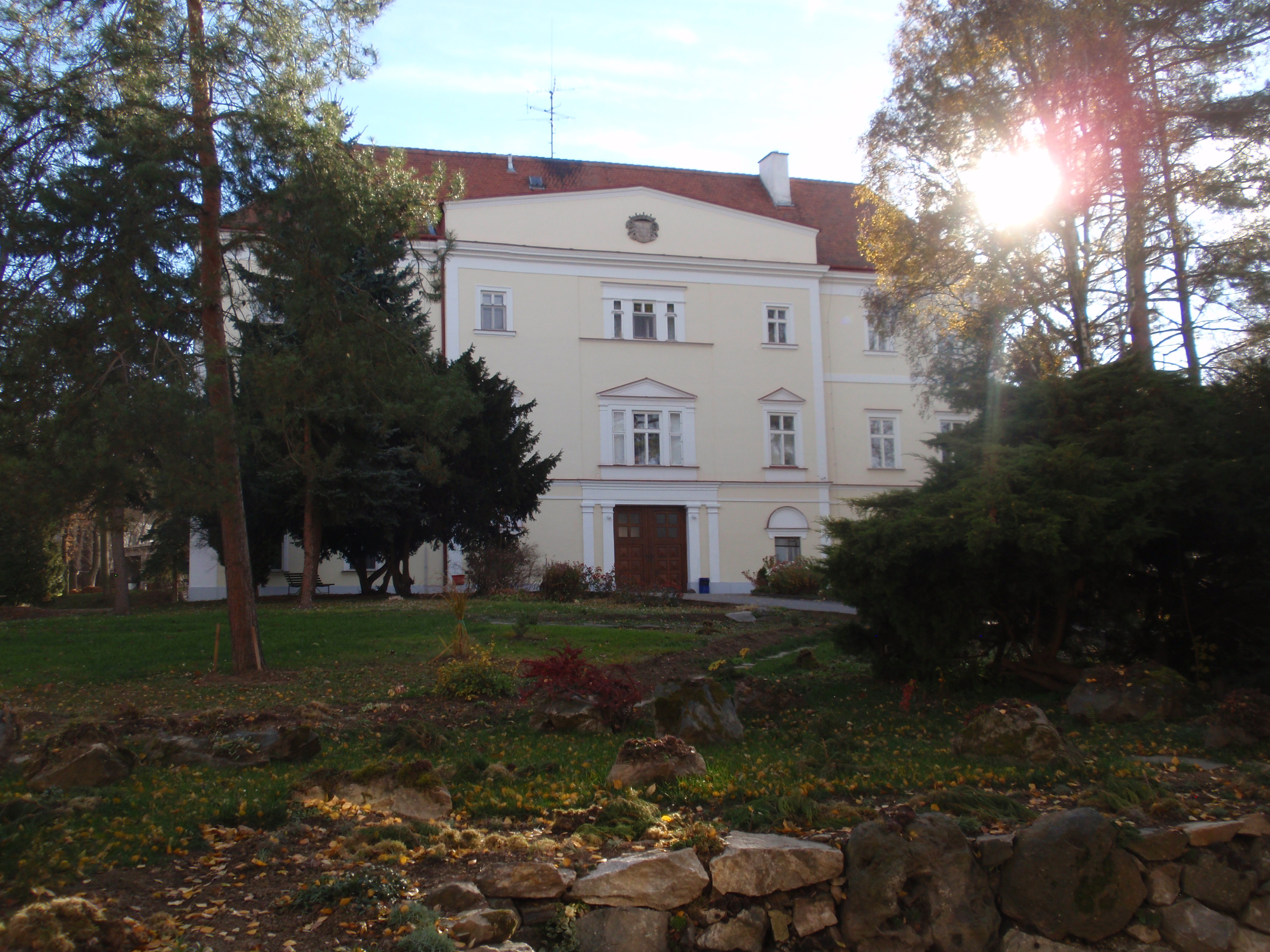 Zámek Plaveč, Plaveč 1, Plaveč.